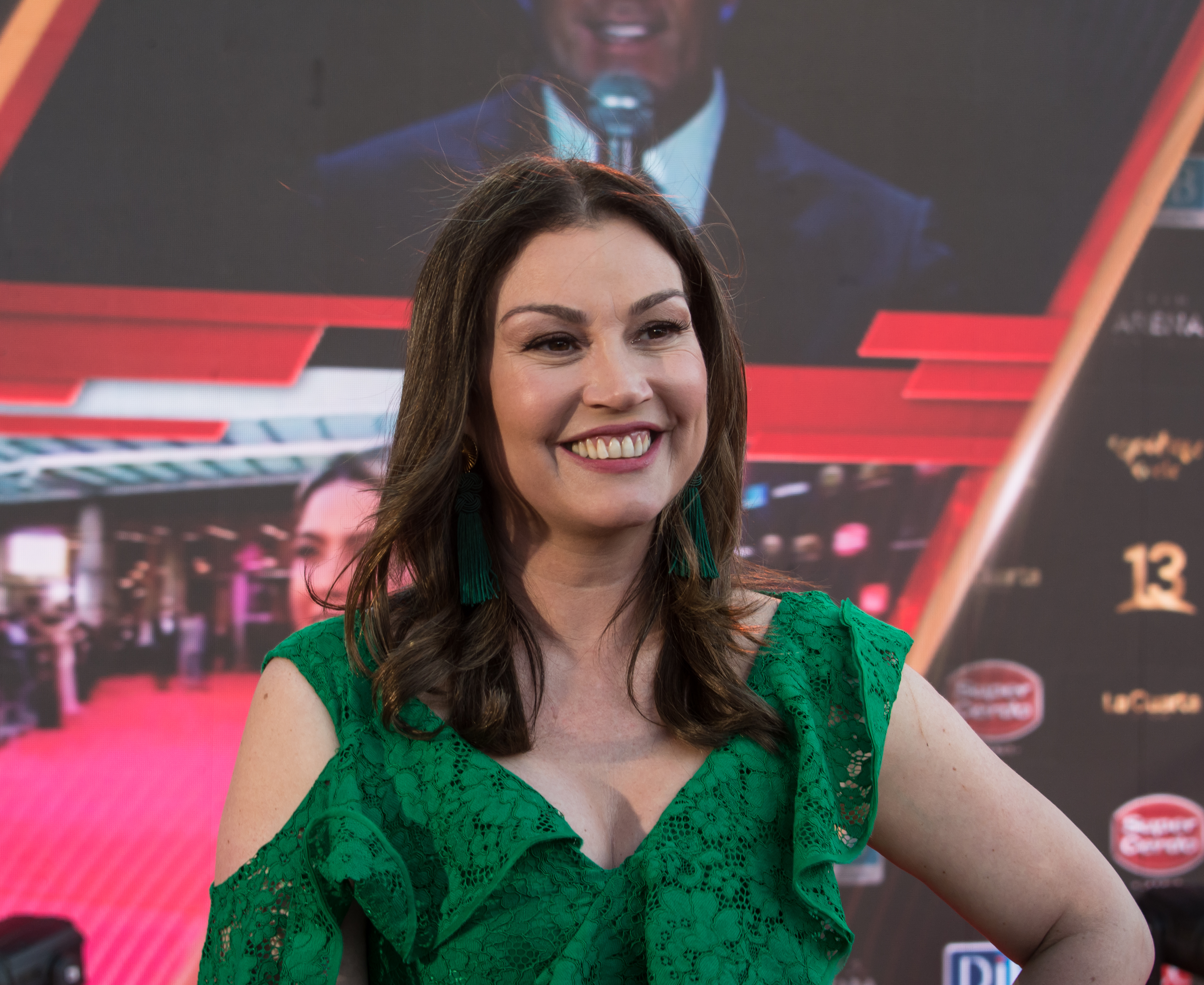 Javiera Contador, Copihue de Oro 2018, Sun Monticello, Mostazal, Región de O'Higgins, Chile